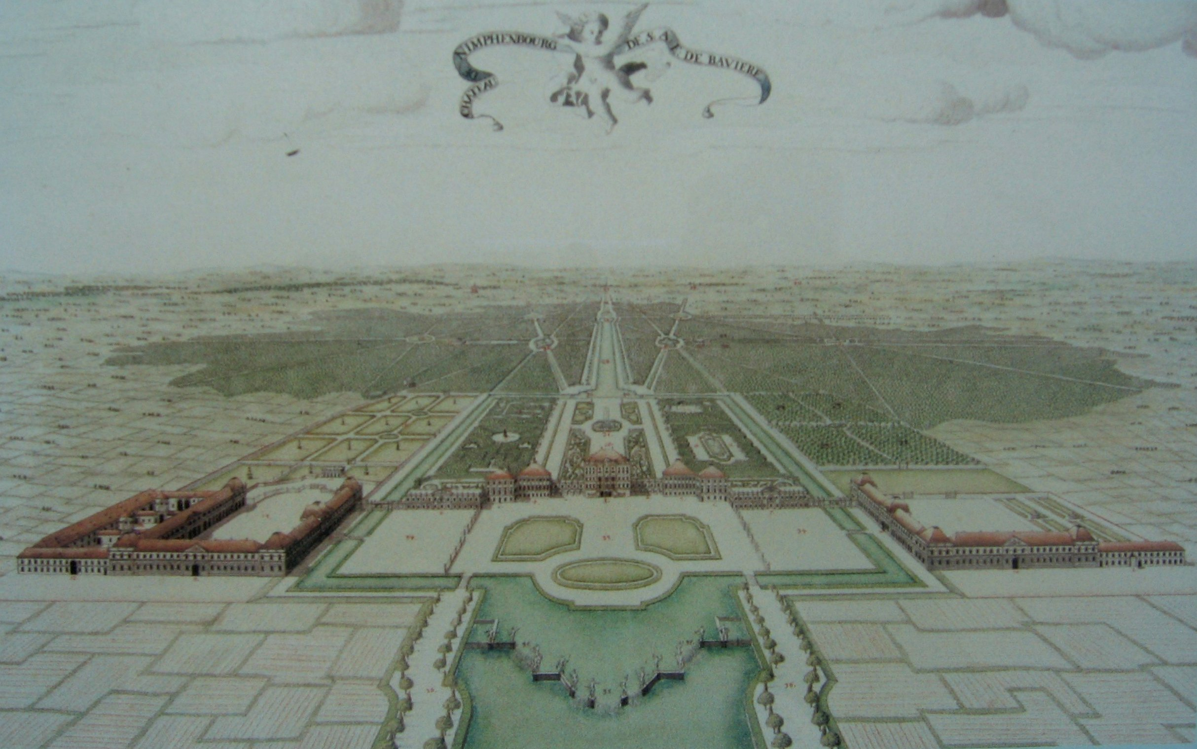 Johann Adam von Zisla: Nymphenburg, 1723